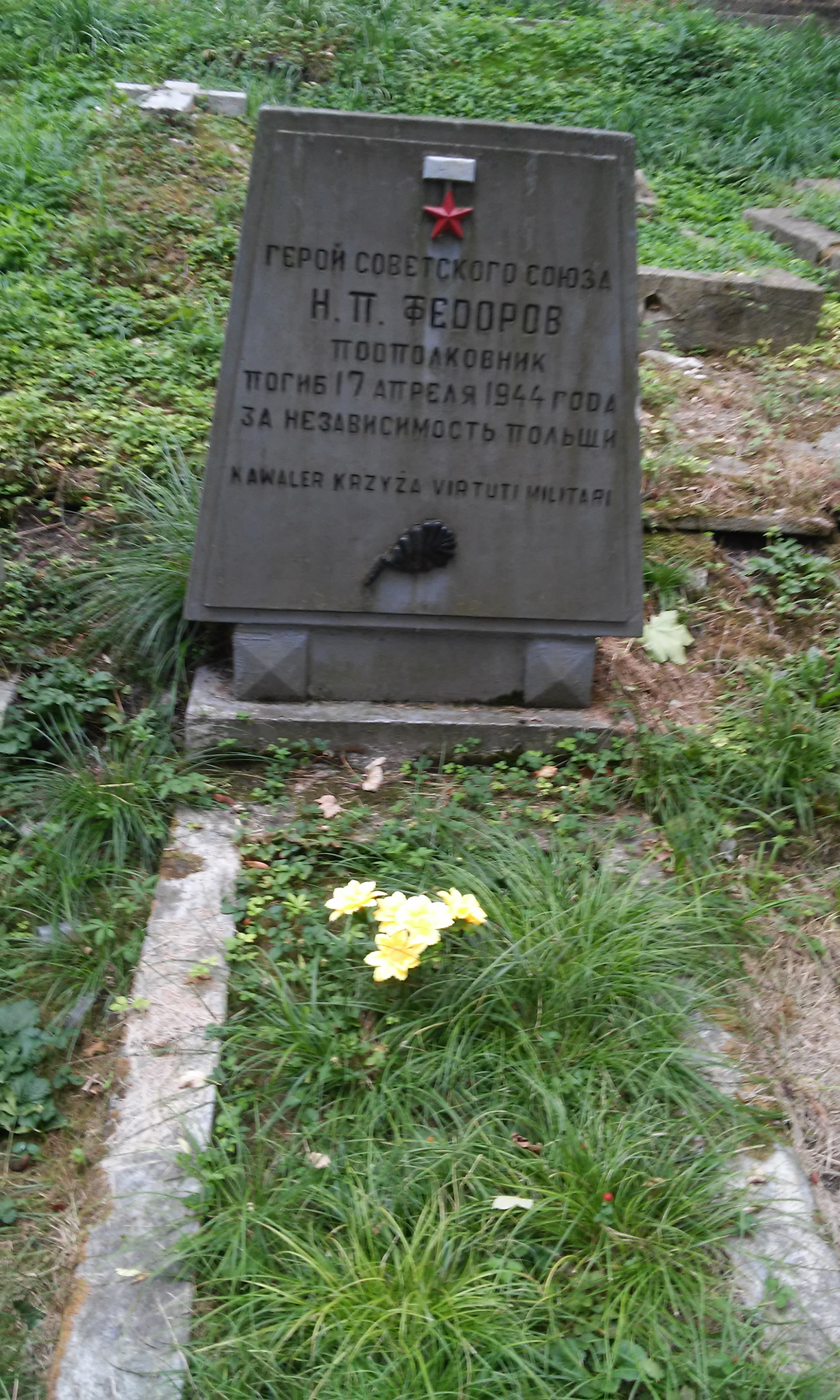 Nagrobek majora Armii Czerwonej, bohatera Związku Radzieckiego Nikołaja Fiodorowa, na cmentarzu wojskowym w Chełmie